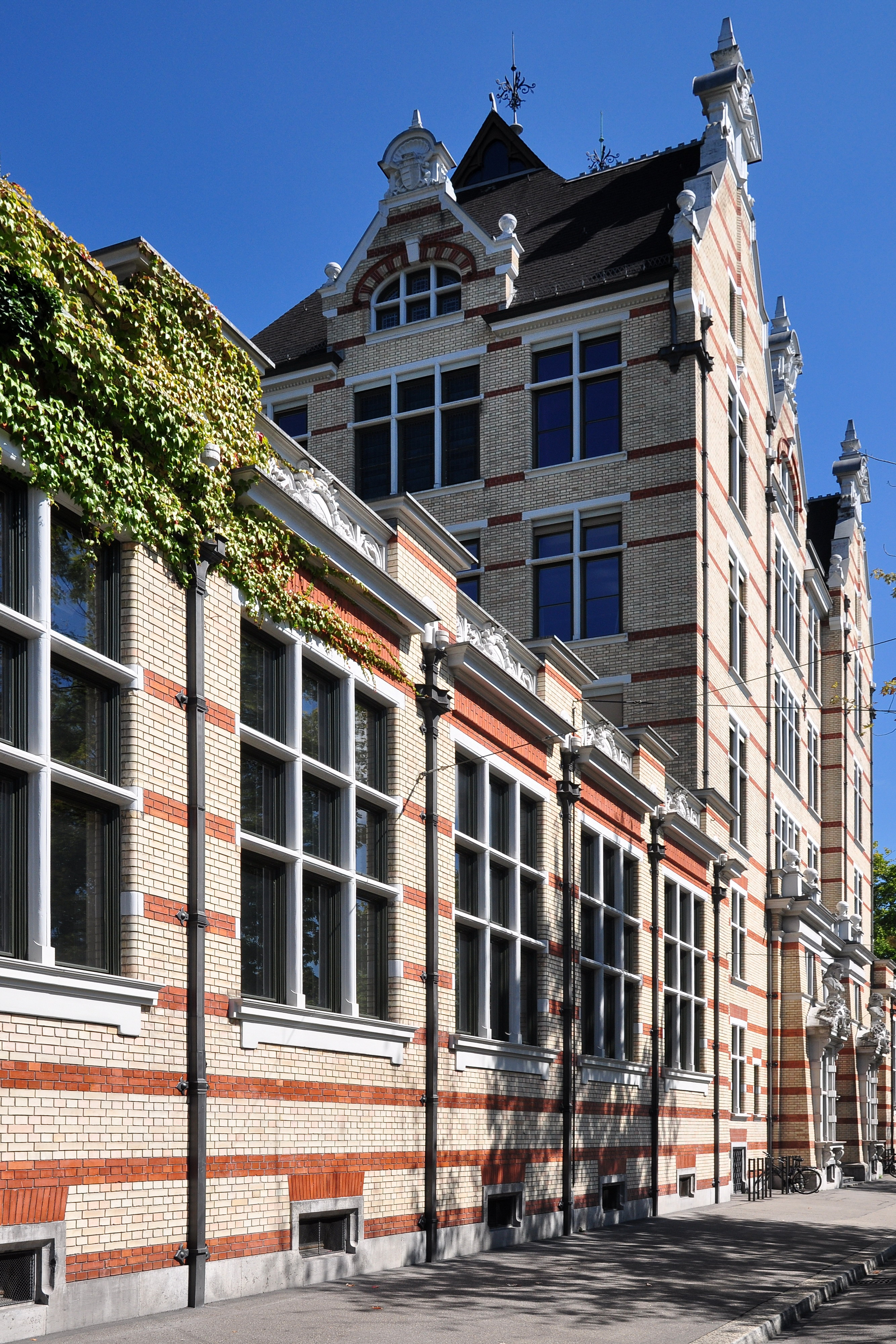 Schulhaus Hirschengraben in Zürich-Hochschulen (Switzerland)